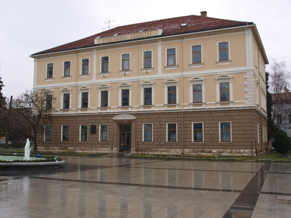 Strojarski fakultet u Slavonskom Brodu.